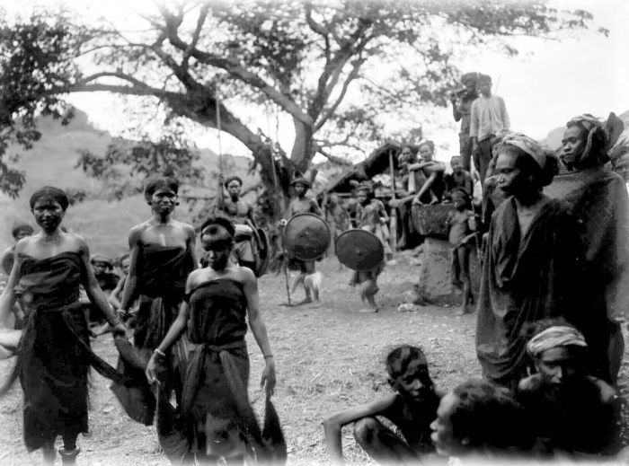 Negatief. Dans van de vrouwen op een feest voor het bivak Batoe Kapoeda in Lamboja, Soemba